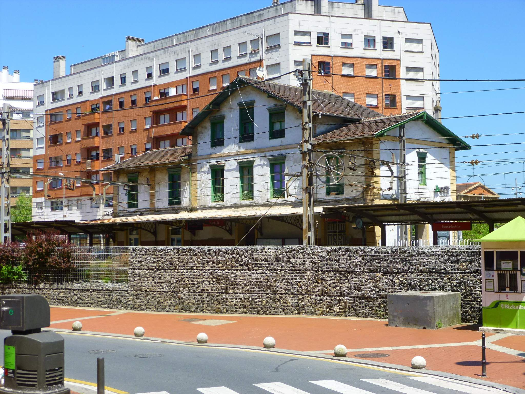 Estación de Desertu-Barakaldo, de Renfe Cercanías, en Barakaldo (Bizkaia)